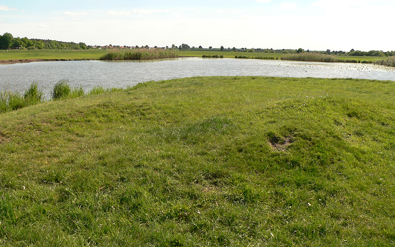 Uhlenburg mit Bodenunebenheiten auf der Hauptburg The motte of Uhlenburg Castle, near Essel, Lower Saxony, Germany.